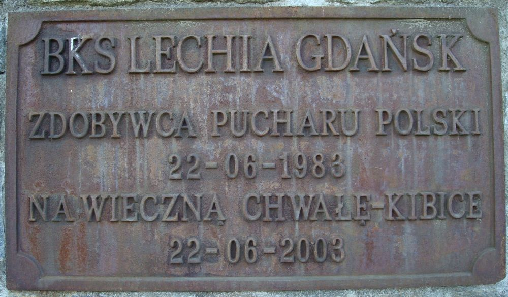 Lechia Gdansk - tablica upamietniajaca zbobycie Pucharu Polski